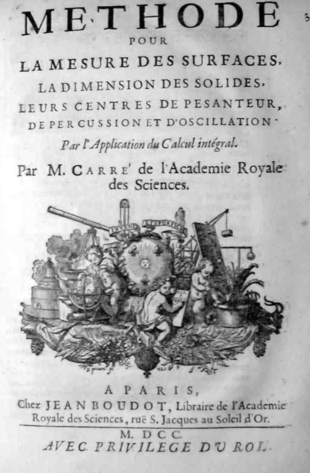 Title page of "Méthode pour la mesure des surfaces" by French mathematician Louis Carré (1663-1711)